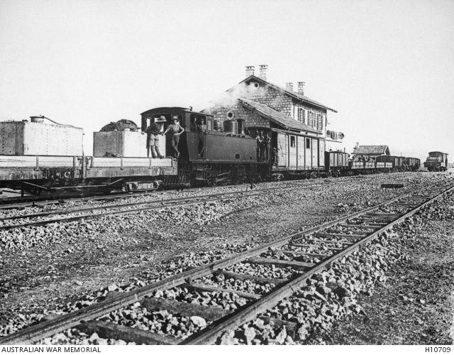 תחנת הרכבת ואדי צראר (נחל שורק) שנקראה גם תחנת הצומת - 1917